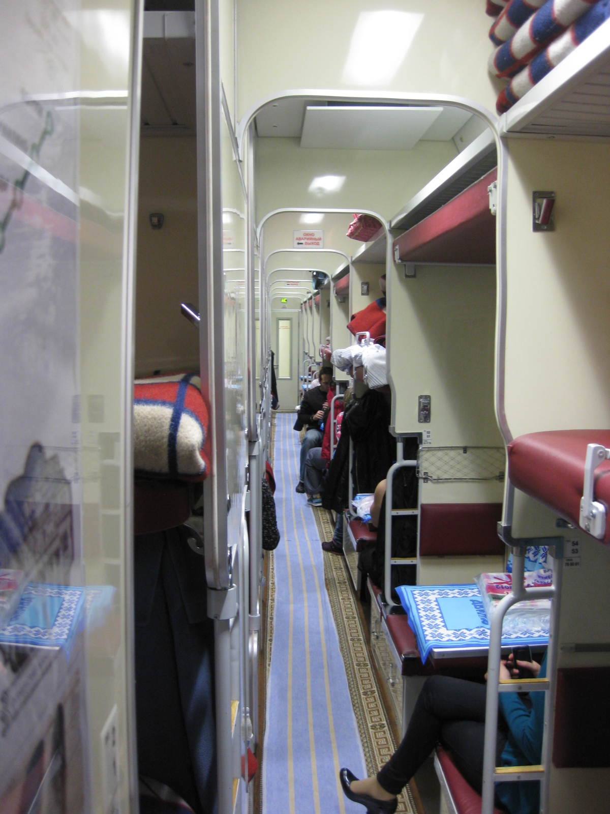 Фирменный поезд "Двина", Полоцк-Москва.